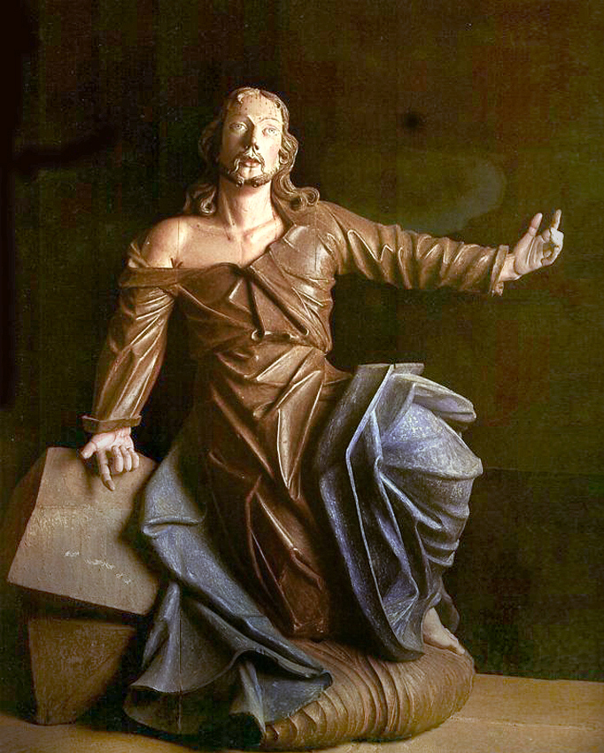 Aleijadinho: Cristo, Santuário de Matosinhos, Brasil